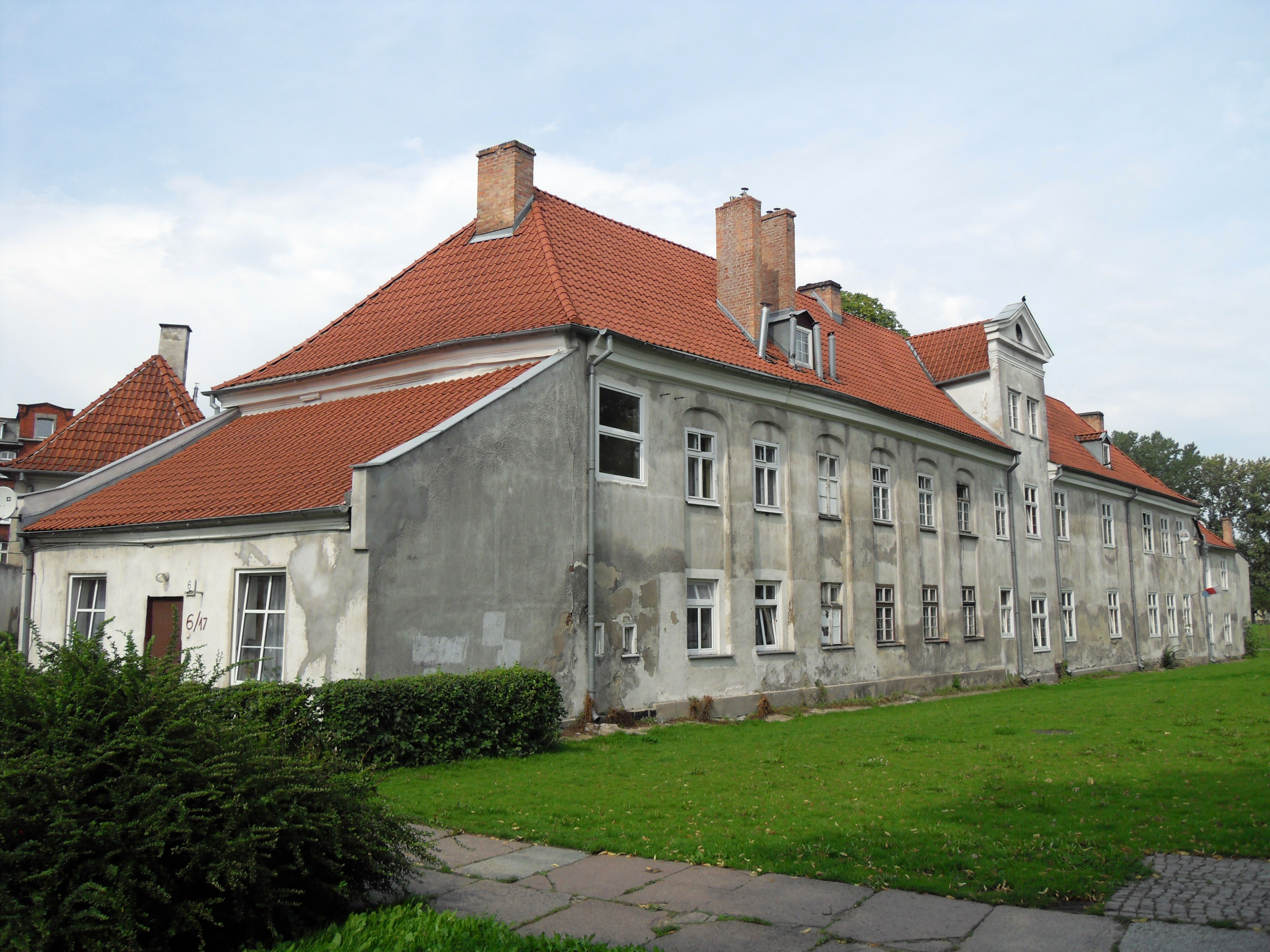 Gdańsk, ul. Sieroca 6 (dawny "sierociniec").